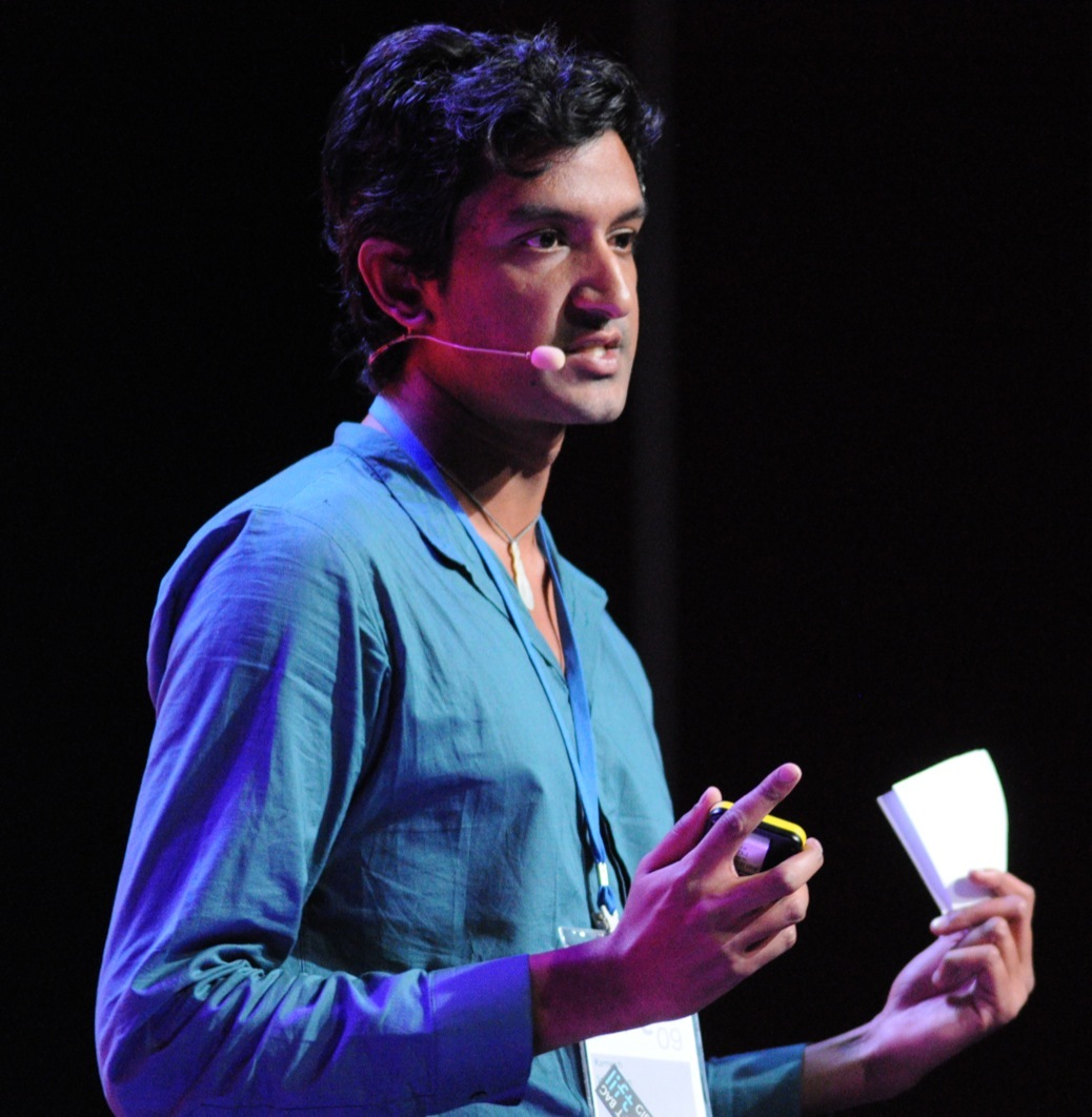 by